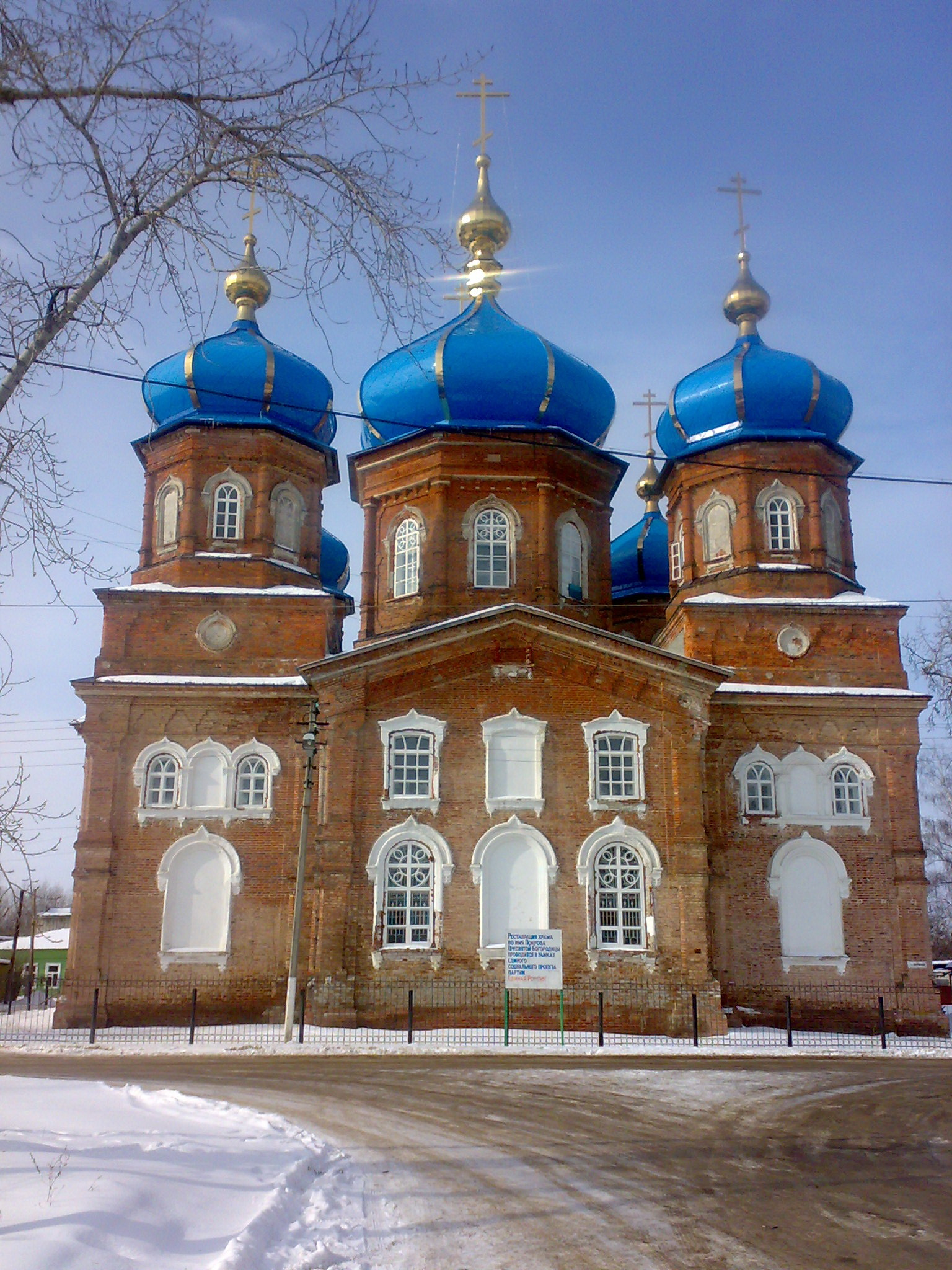 Петровск. Церковь Покрова Пресвятой Богородицы